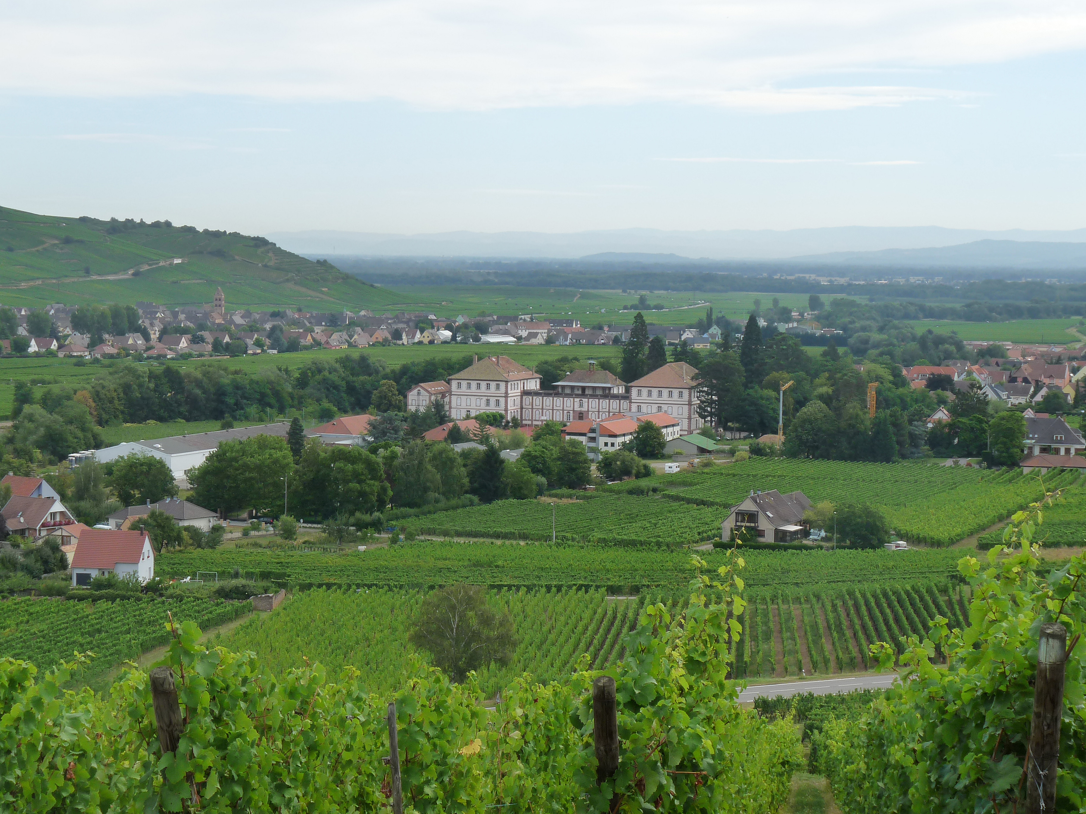 Kientzheim (Haut-Rhin) : Centre européen d'études japonaises d'Alsace (CEEJA), bâtiment occupé par le lycée japonais Seijo jusqu'en 2005